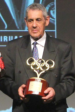 En el centro de Eventos Casapiedra el Comité Olímpico de Chile encabezado por su presidente Neven Ilic, realizó una gala de celebración de sus 80 años. A la ceremonia asistió la Ministra de Deportes Natalia Riffo, la Subsecretaria Nicole Sáez y el Director nacional del IND Ricardo Loyola. Santiago, Chile 20/11/2014 Foto: Max Montecinos/IND